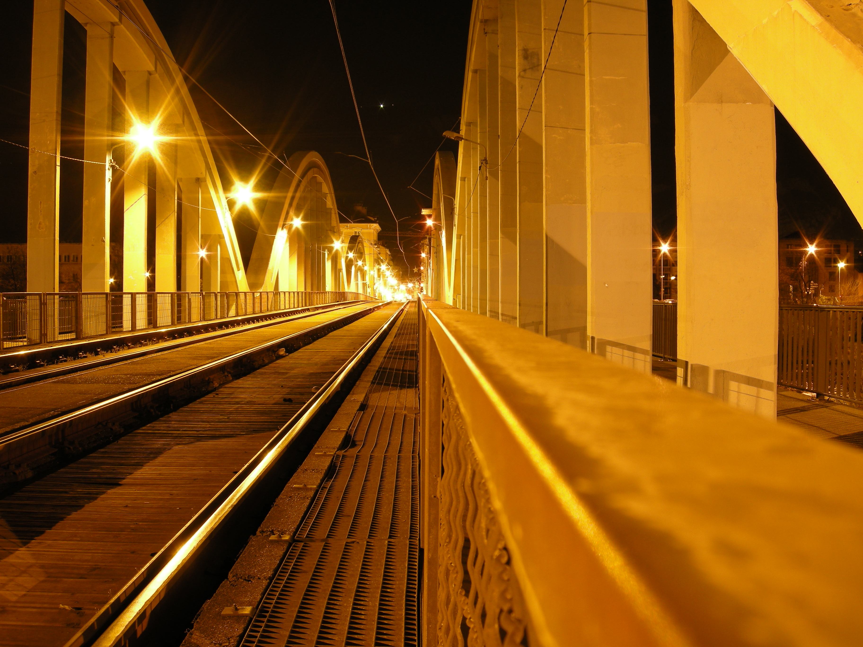 Pont du Drac, Fontaine (38), France